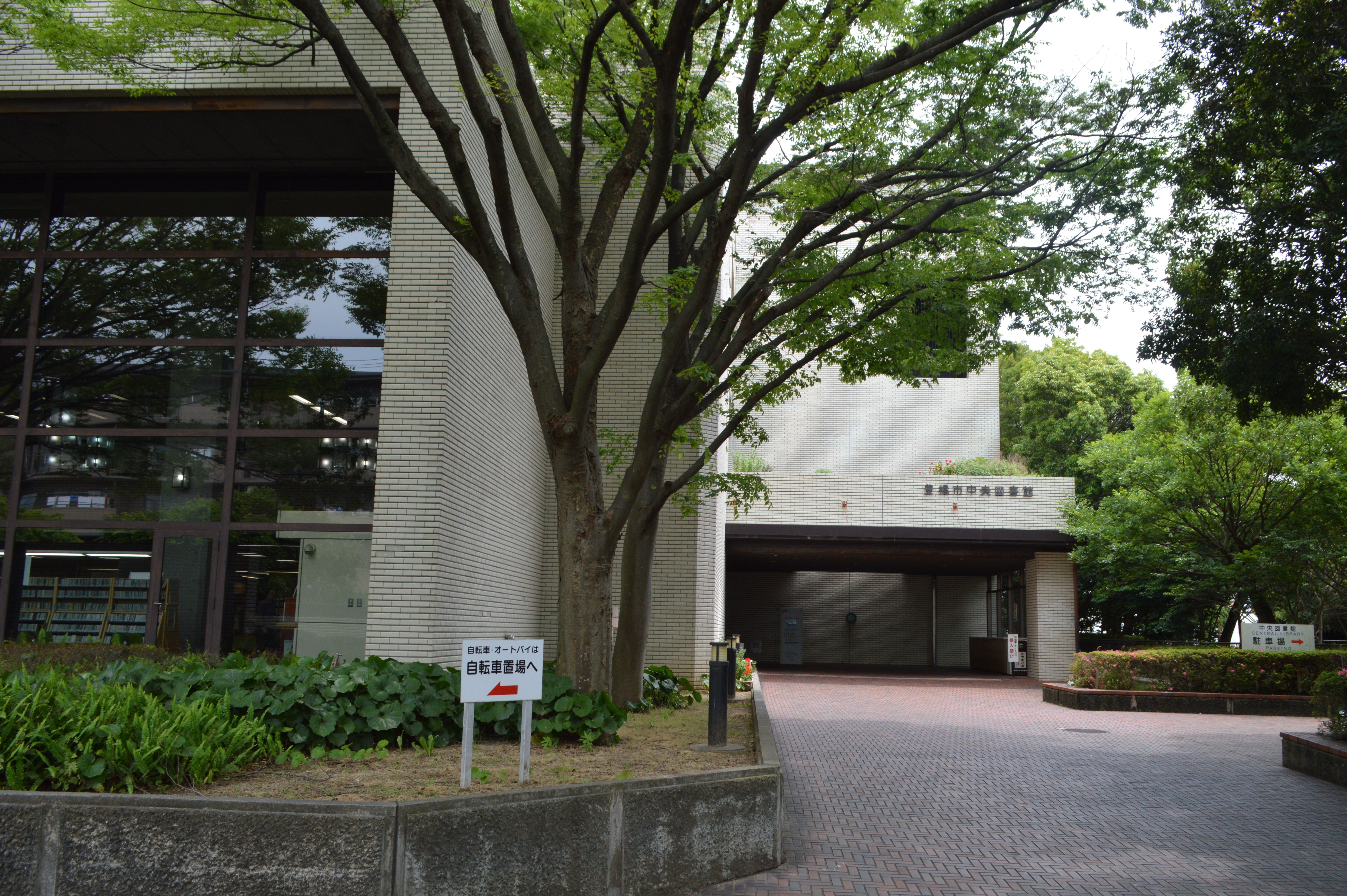 豊橋市中央図書館（豊橋市図書館）